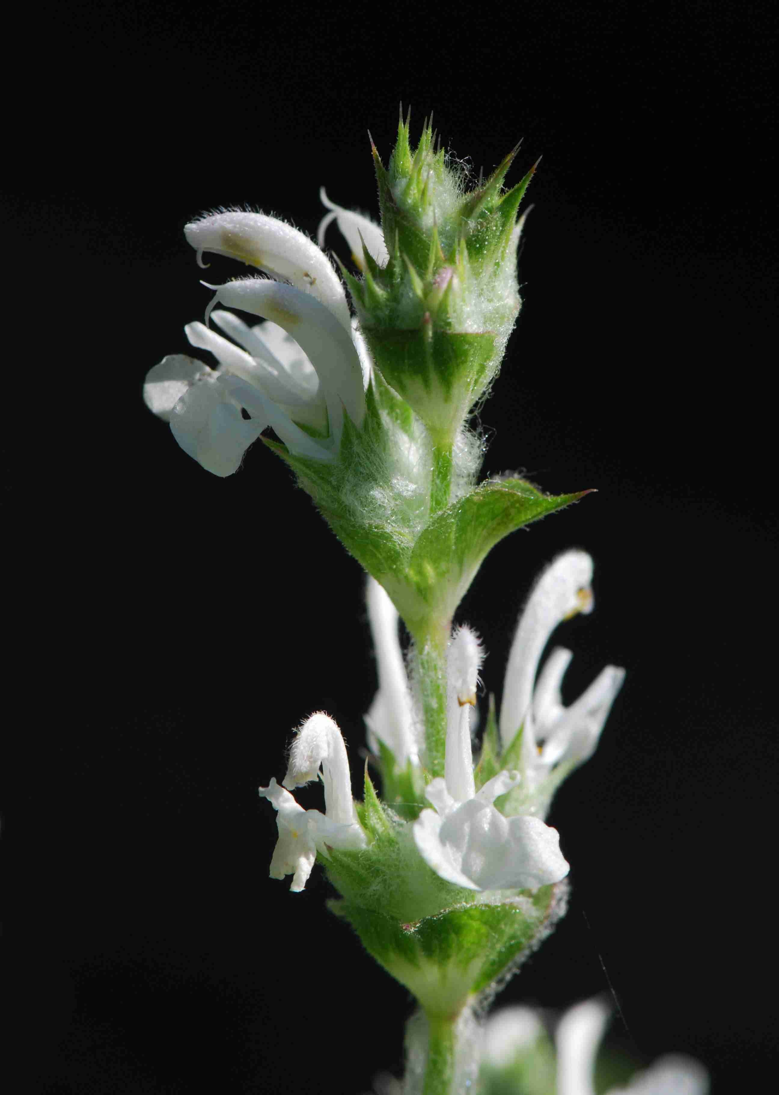 Salvia aethiopis, Jardin des Plantes de Paris